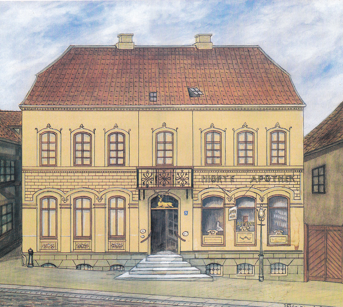 Hjorteapoteket, tegning fra 1842